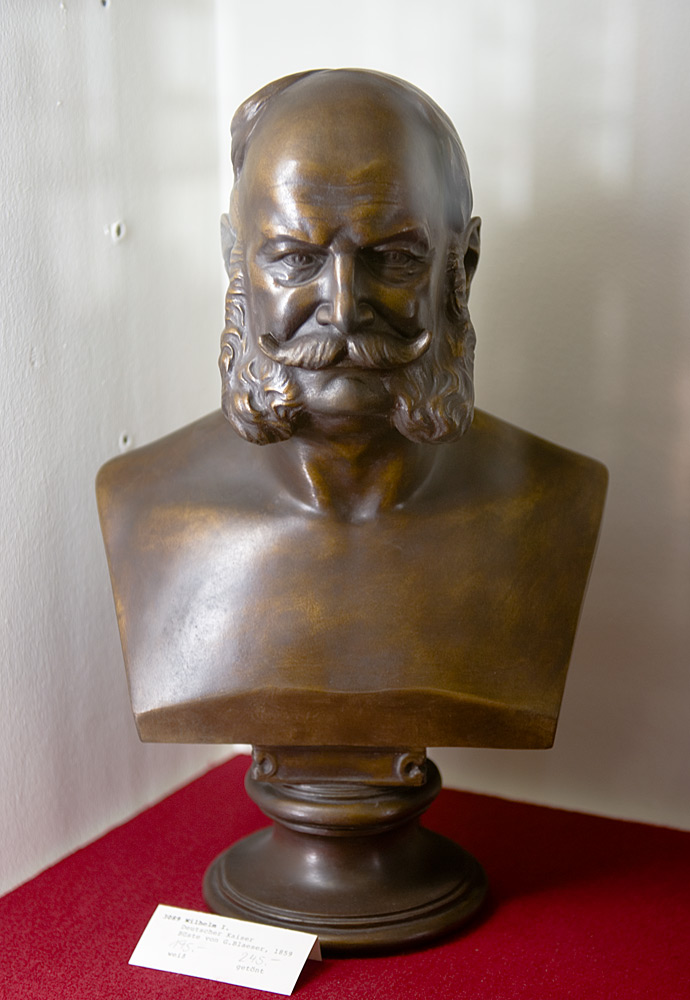 Wilhelm I. Deutscher Kaiser, Büste von Gustav Blaeser 1859, Gipsformerei Ausstellungsraum "Staatliche Museen zu Berlin" (Sophie-Charlotten-Straße 17/18, 14059 Berlin-Charlottenburg)